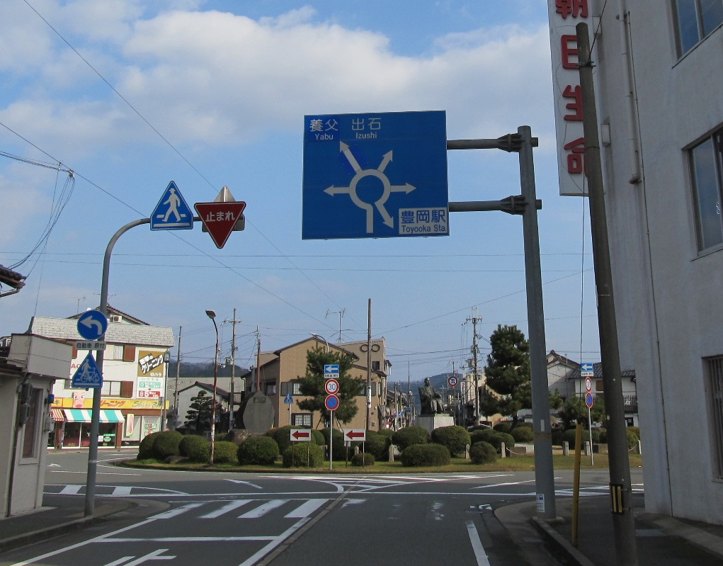 豊岡郵便局の南にあるロータリー